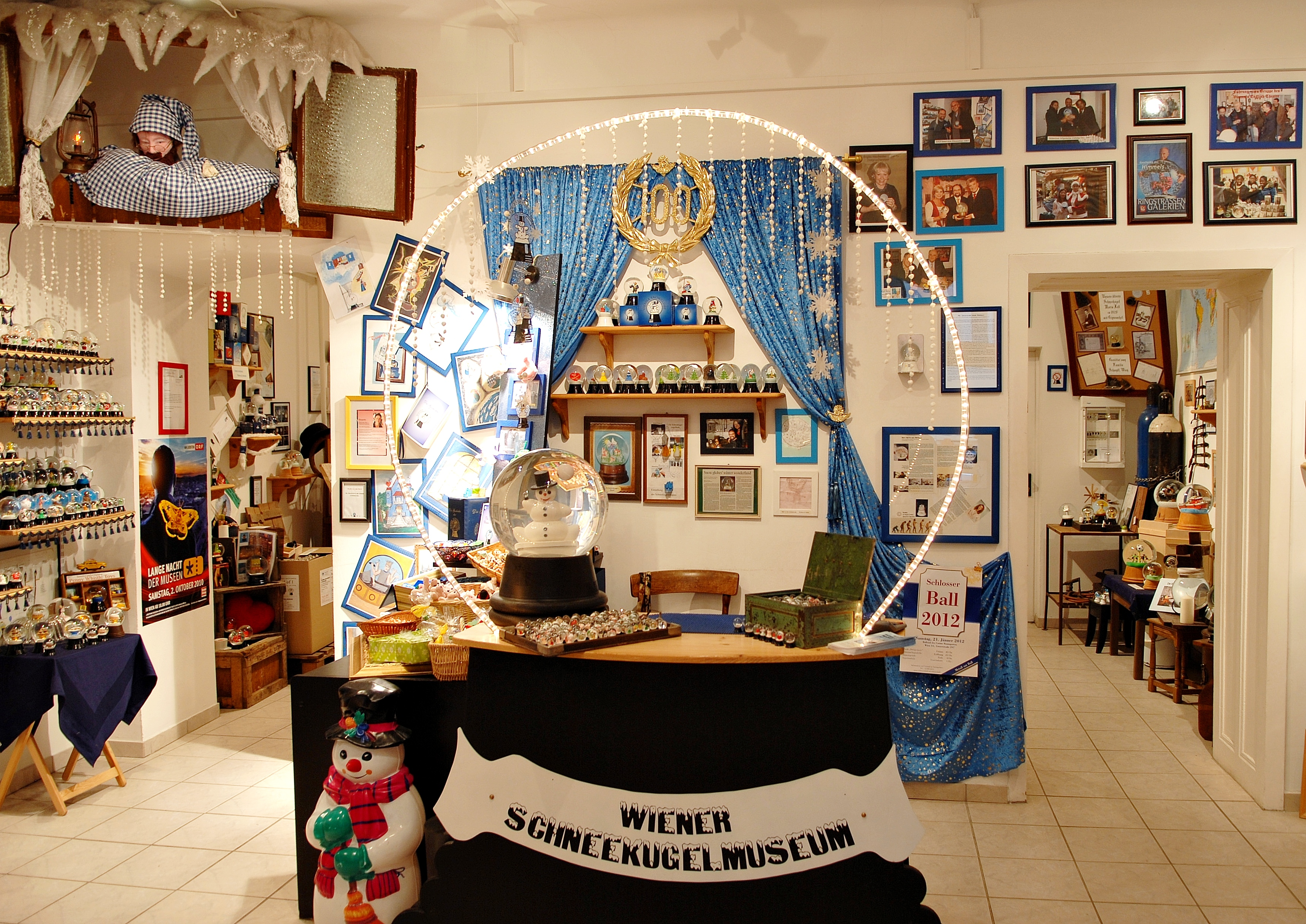 Wiener Schneekugelmuseum, Dezember 2011